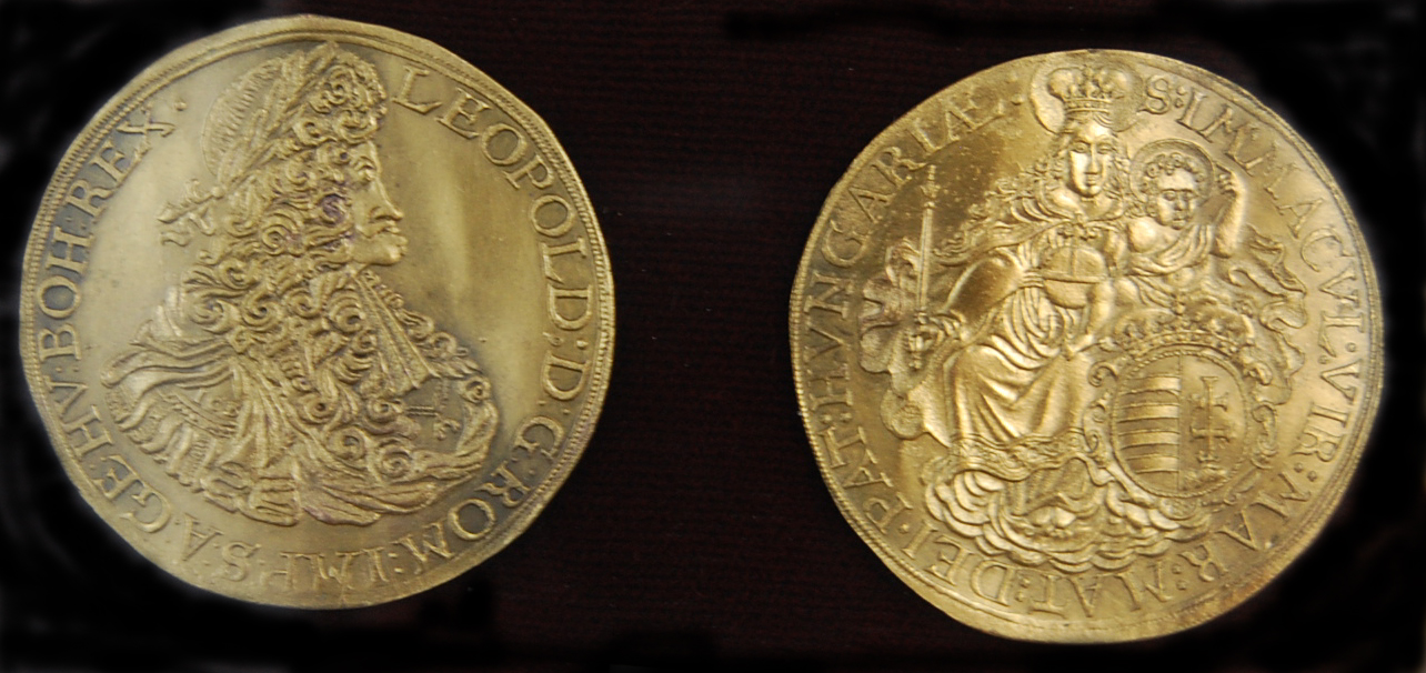 I. Lipót császár aranykrajcára Lendván (17. század)